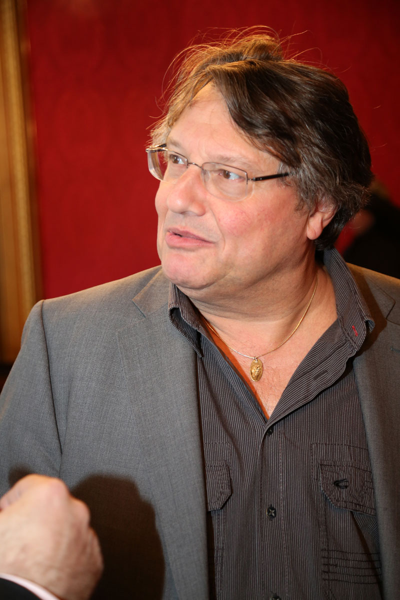 Prof. Joesi Prokopetz-2166